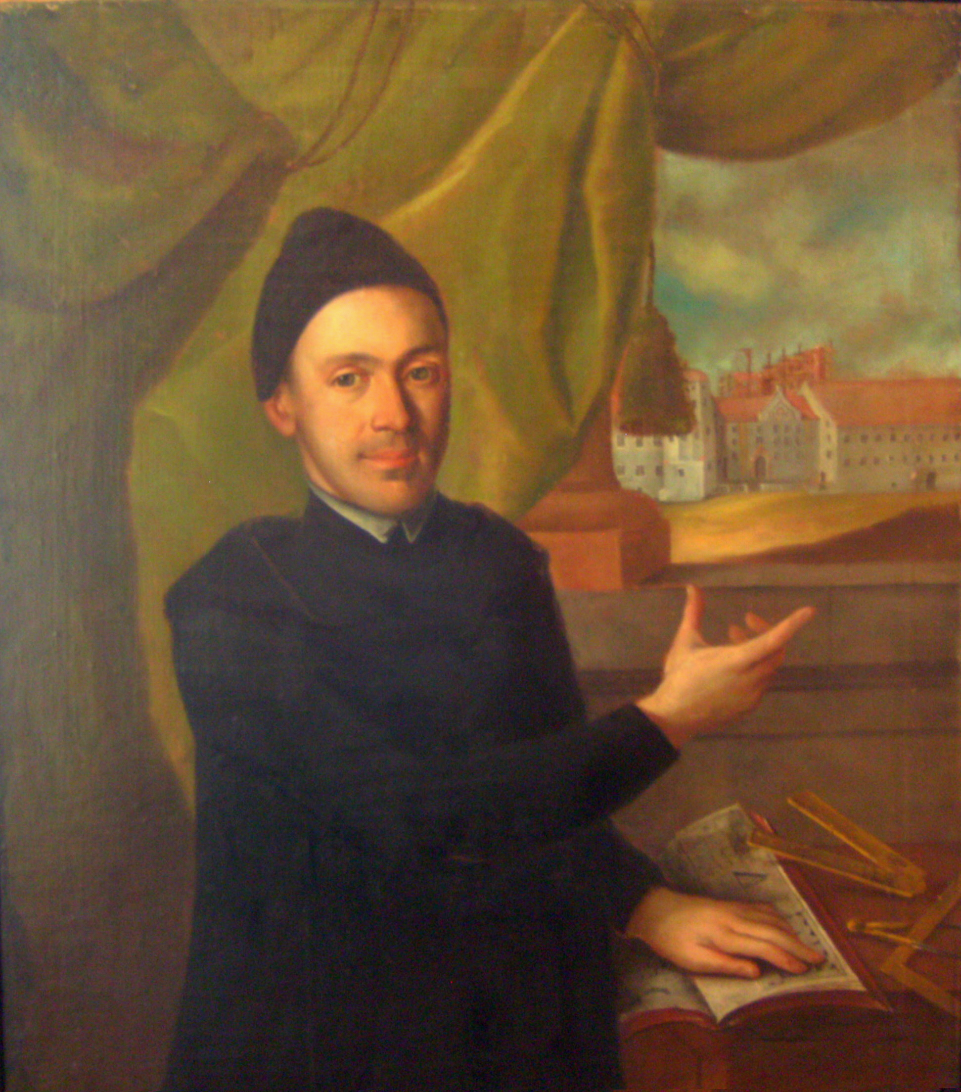 Basilius Perger, Erbauer der Sternwarte Ochsenhausen